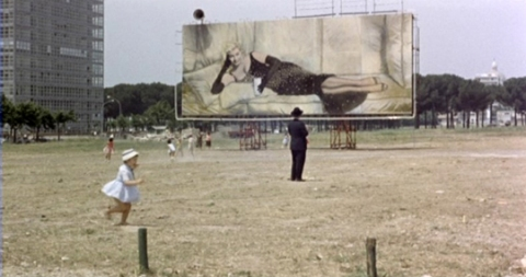 Képkocka a „Doktor Antonio megkísértése” című filmből